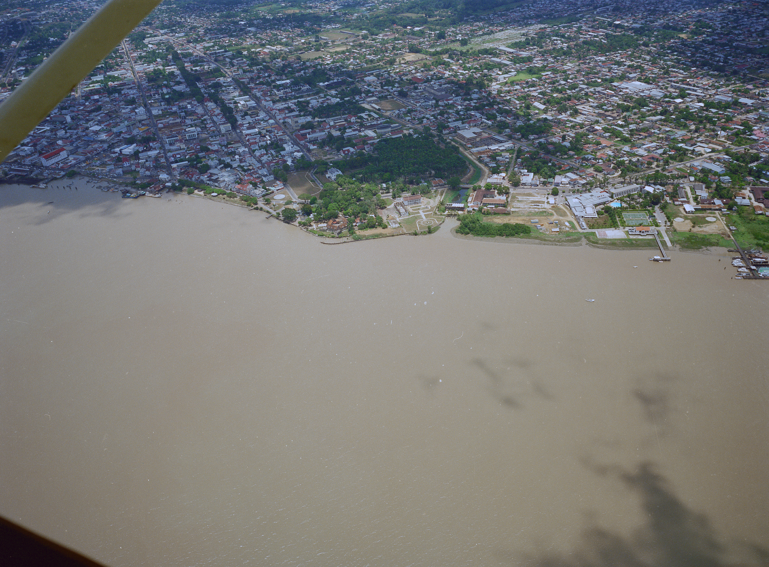 Koloniale geschiedenis/ Luchtfoto: Overzicht van uit de lucht van Paramaribo (opmerking: Suriname reis Loek Tangel)